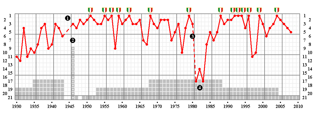 Diagram końcowych miejsc w lidze włoskiej zespołu piłkarskiego A.C. Milan Diagram of AC Milan finishing positions in italian league 1. - Serie A zawieszona z powodu wojny / Serie A suspended (World War II) 2. - eliminacje (25 zespołów w 2 grupach) i grupa finałowa / qualifications (25 teams in 2 groups), then final round 3. - degradacja do Serie B / relegation to Serie B 4. - 1. miejsce w Serie B i awans do Serie A / 1st in Serie B and promotion to Serie A Białe kratki - Serie A / white bars - Serie A Szare kratki - Serie B / grey bars - Serie B